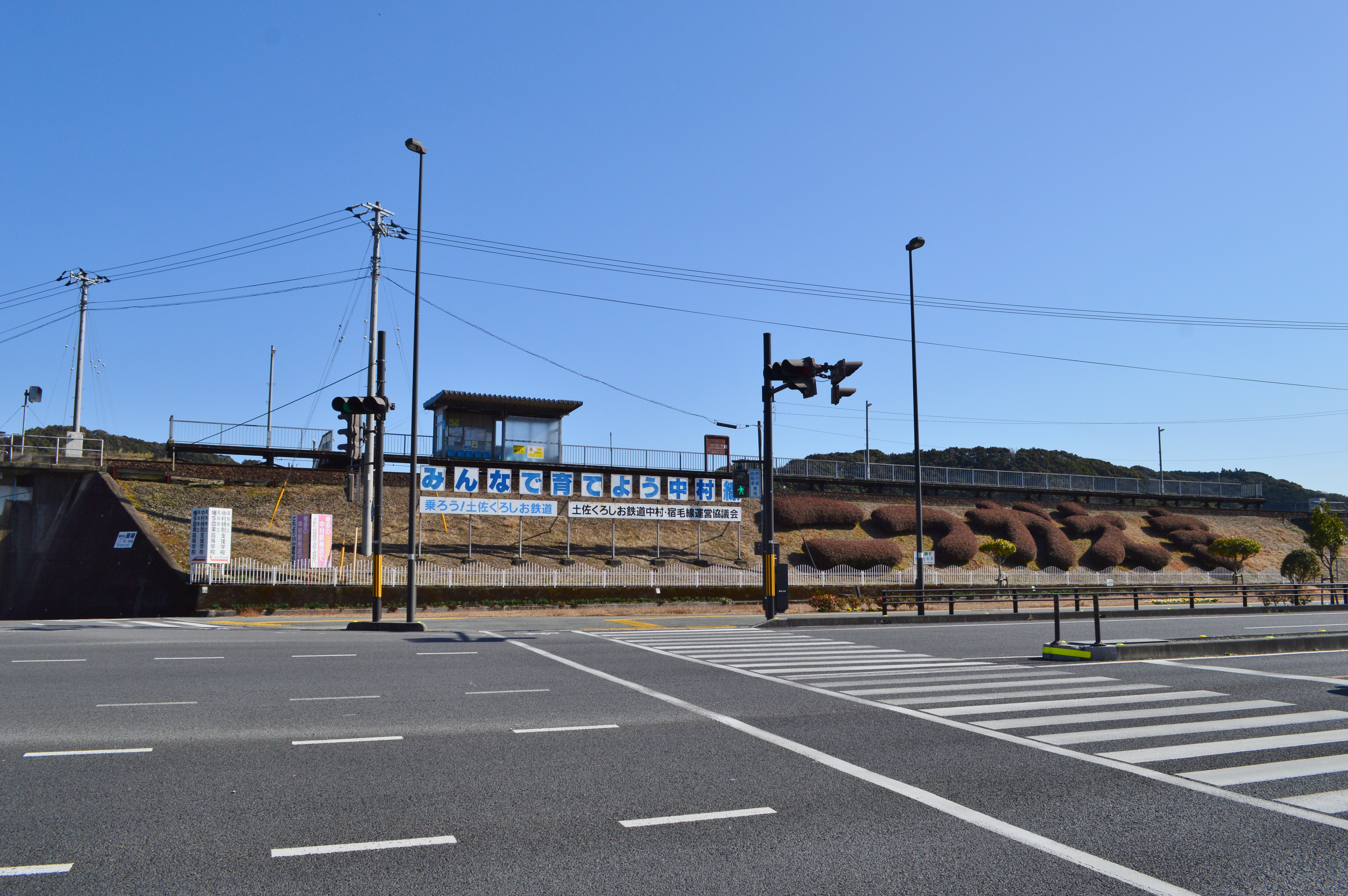 古津賀駅 全景